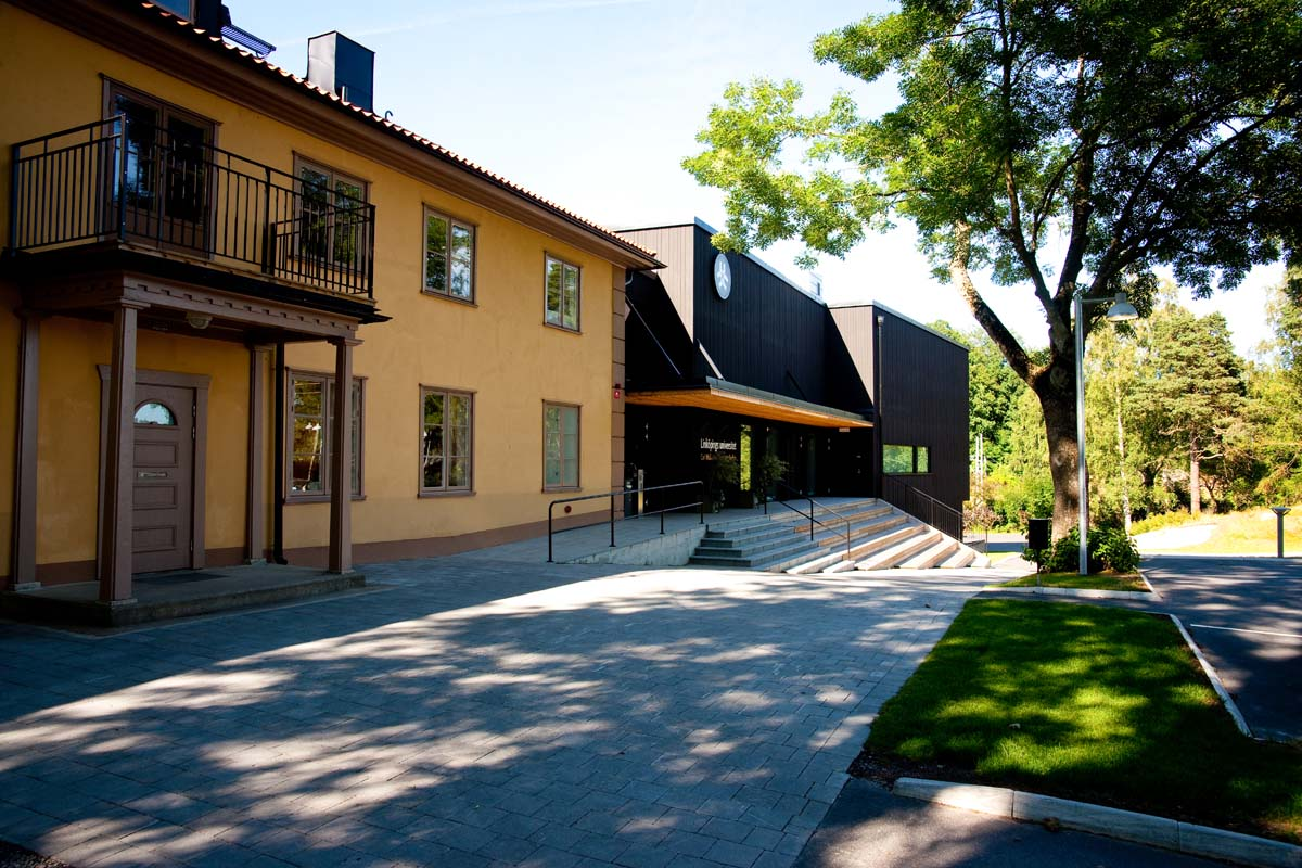 Linköpings universitet, Carl Malmsten furniture studies, Byggmästare John Mattsons bibliotek, Lidingö